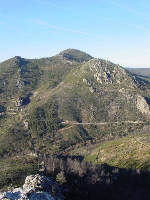 Vista da Serra do Moradal, a partir do miradouro sobre o vale da ribeira.